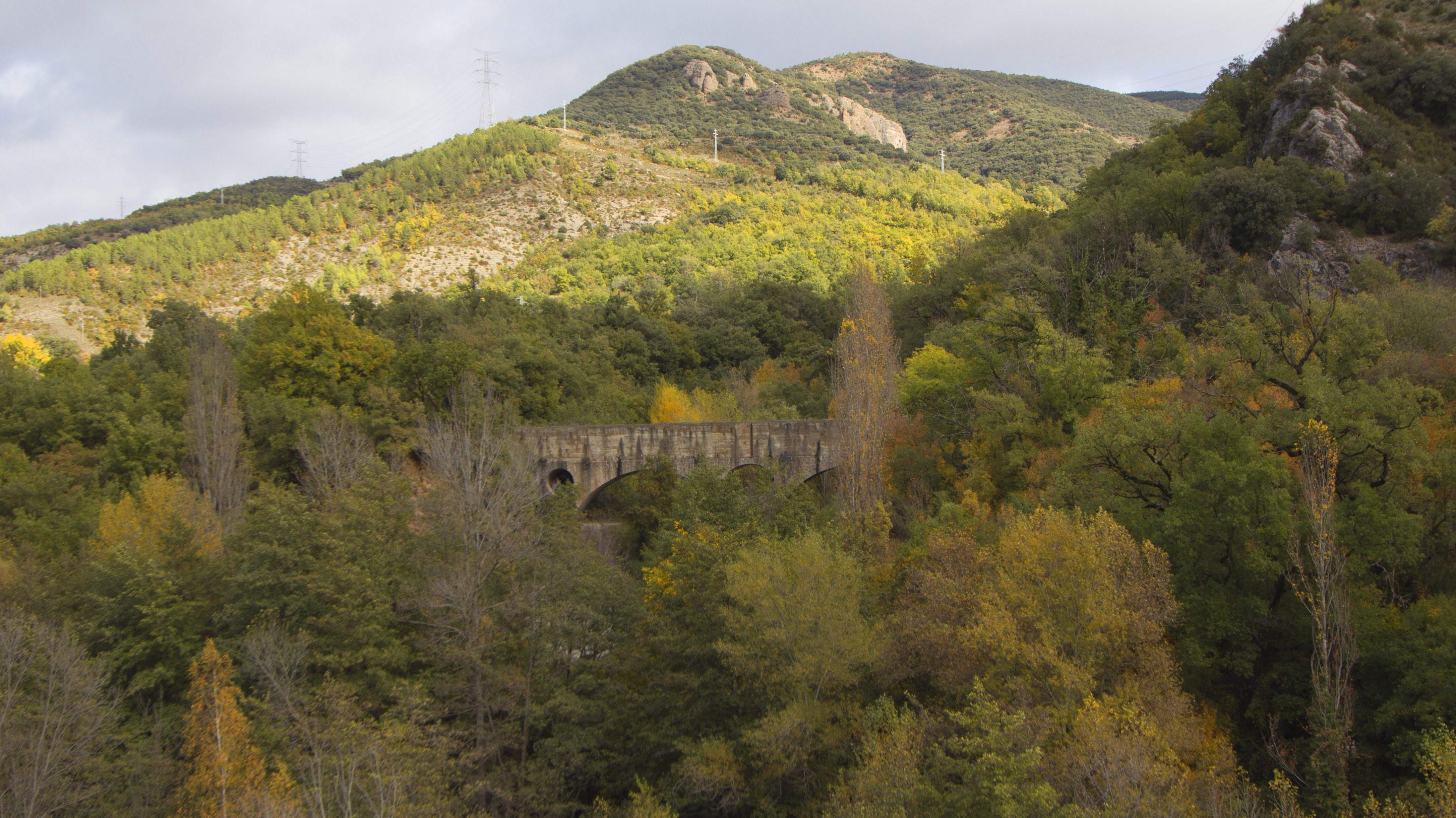 Pont del Canal al Barranc de Sant Joan, a Senterada (Pallars Jussà)